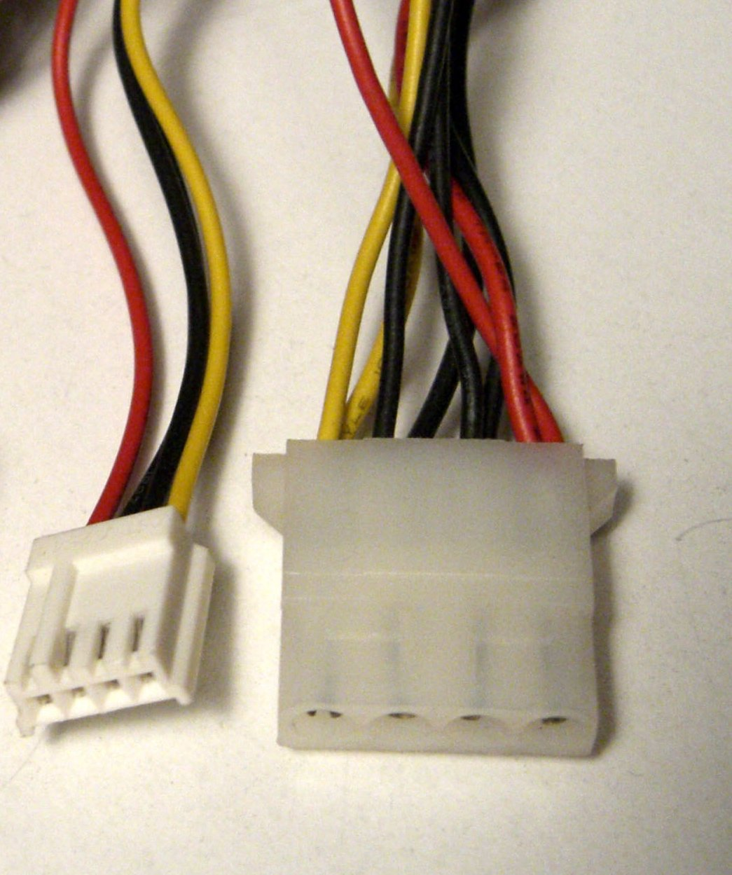 Die beiden 4-pin Molexstecker